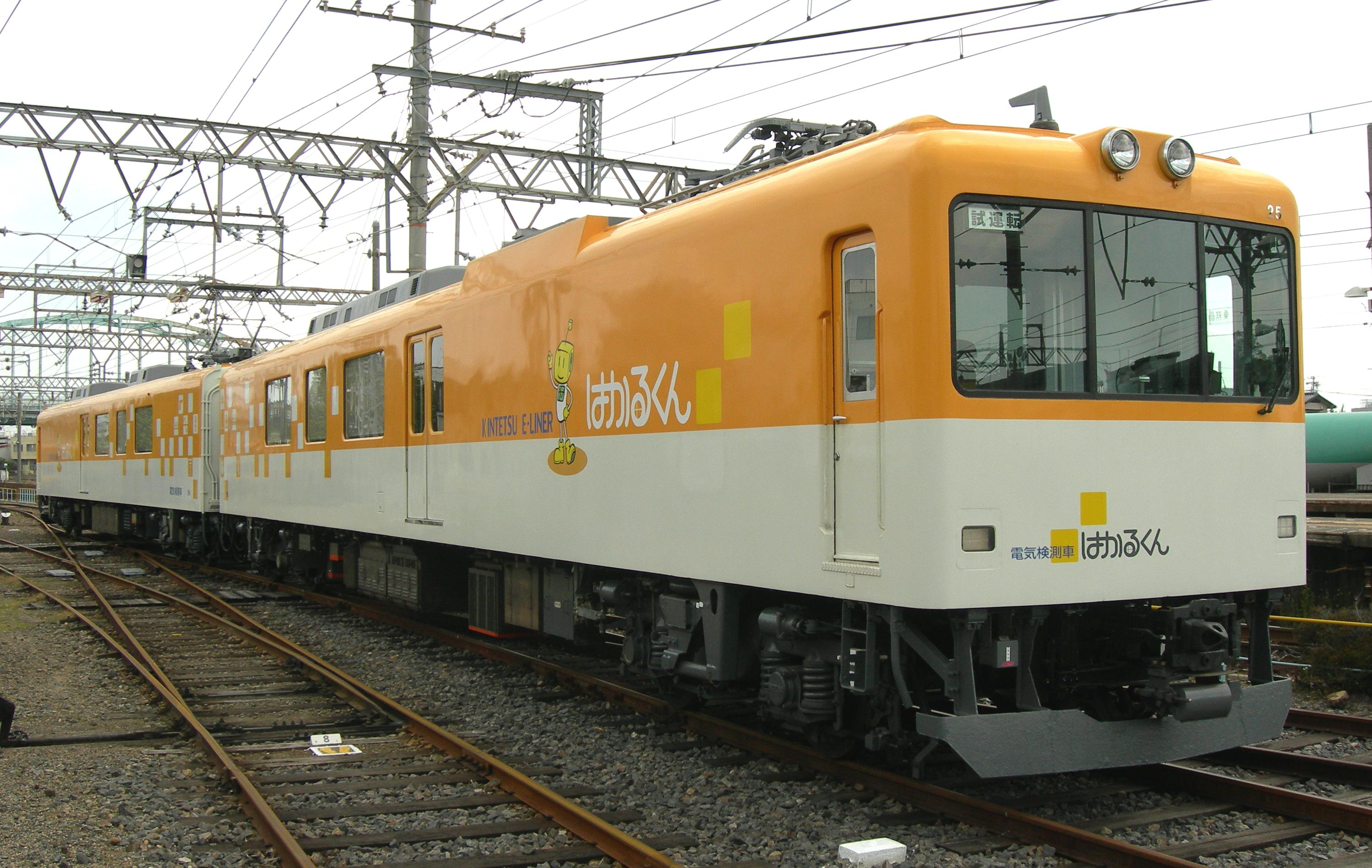 Kinki Nippon railway series mowa24 (Hakaru-kun)